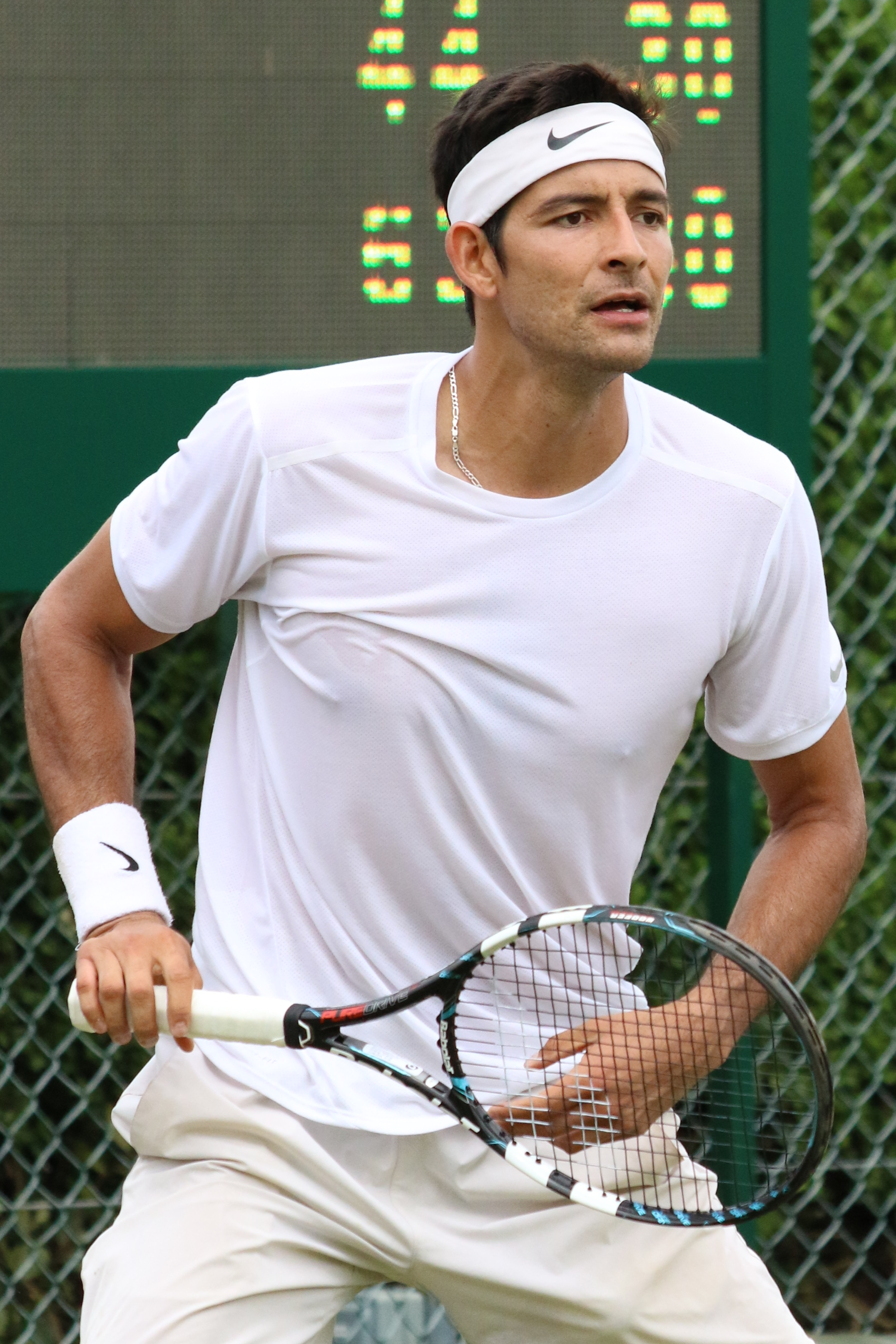 Arevalo WMQ16 (10)